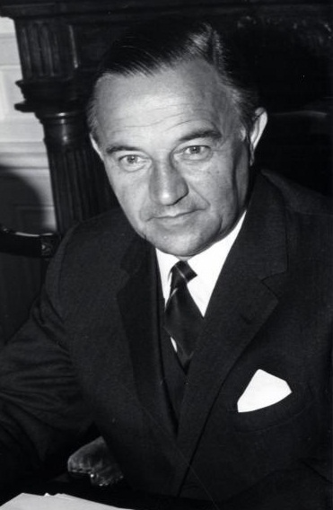 Jong, P.J.S. de (KVP). Minister De Jong legt een verklaring af na een ministerberaad over de situatie rond de invasie in Tsjecho-Slowakije. Nederland, Den Haag, 21 augustus 1968.